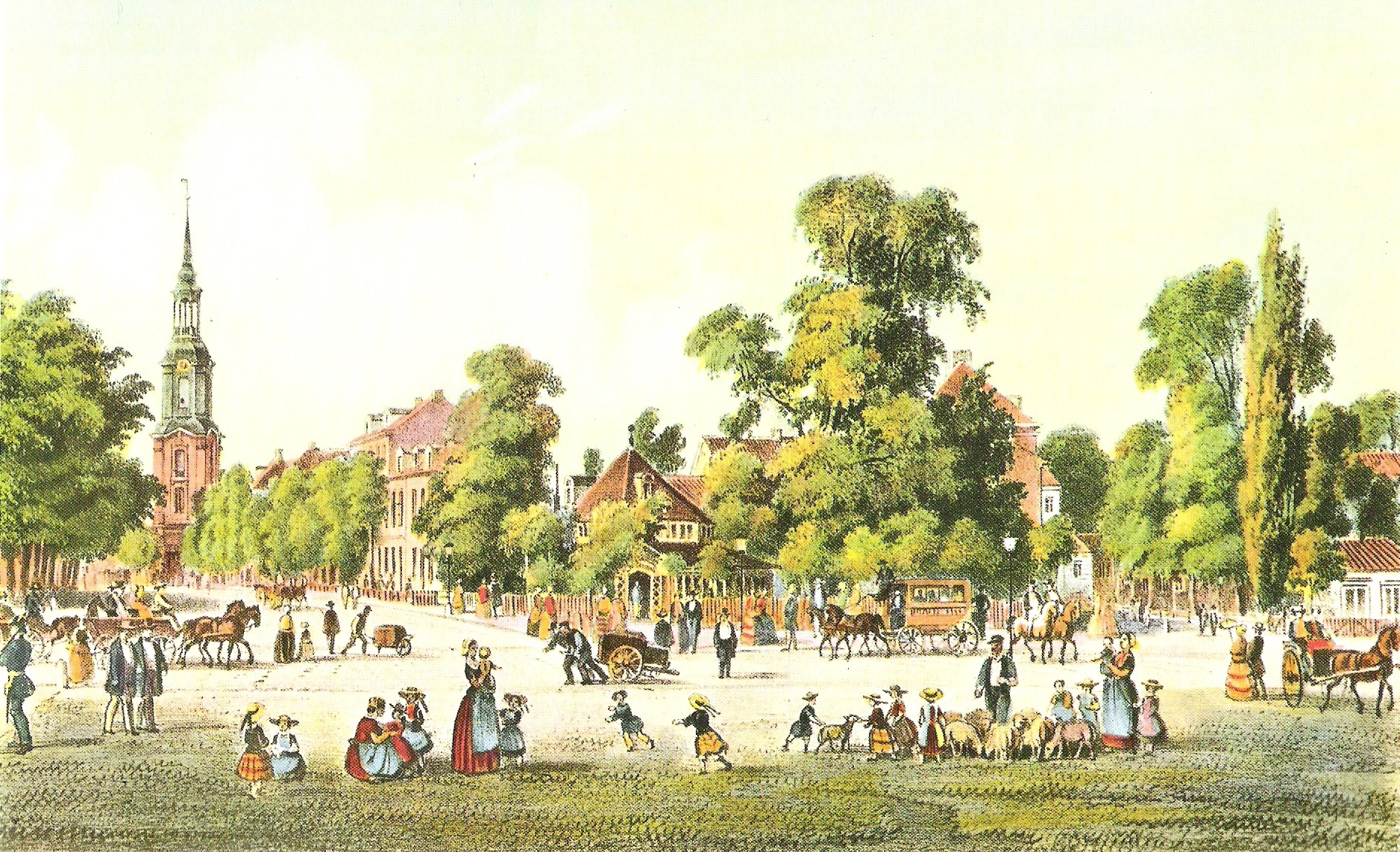 St. Georg im Jahre 1855, links die Dreieinigkeitskirche.